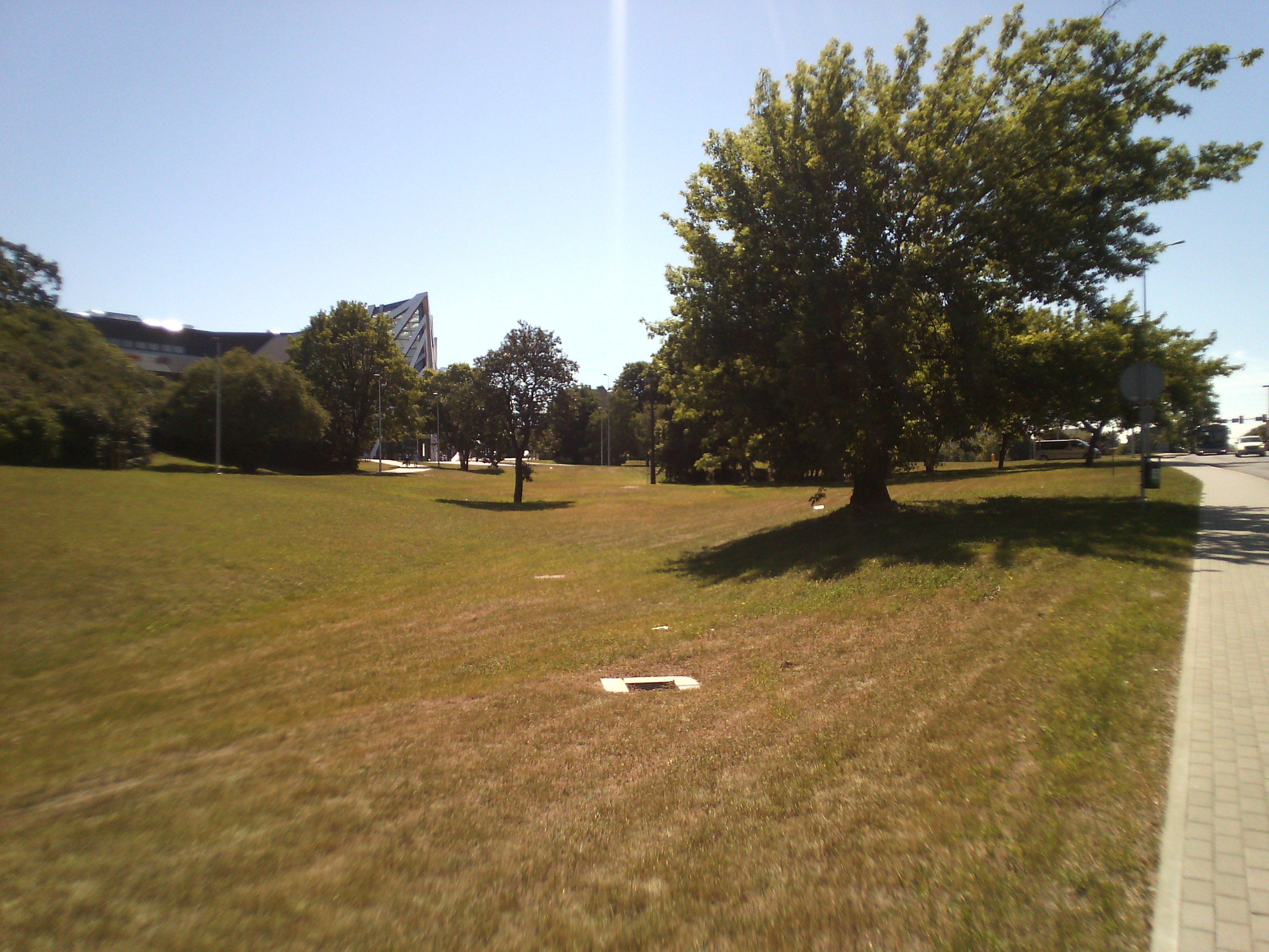 Dawna ulica Karpacka po przebudowie